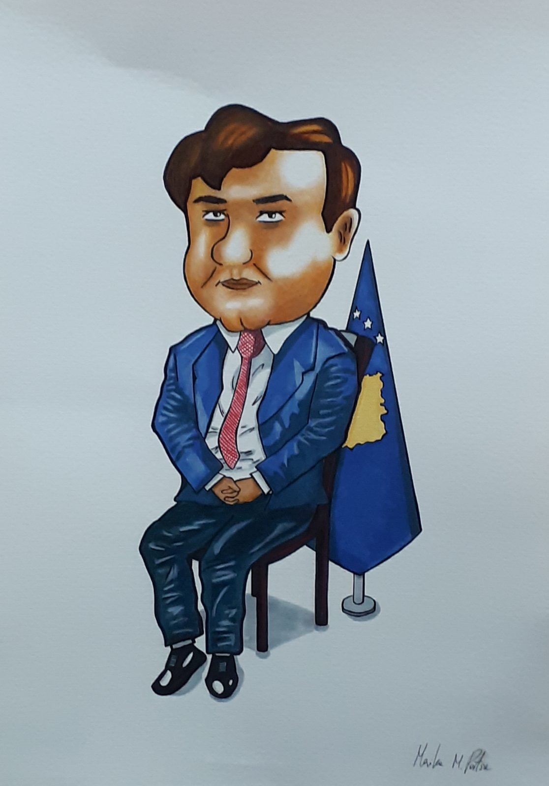 Lulzim Tafa karikature